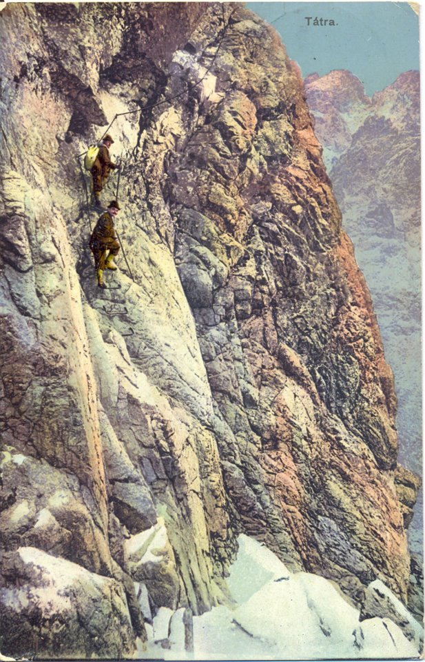 Fotografia zachytáva výstup na Lomnický štít v roku 1902 Jordánovou cestou vo Vysokých Tatrách